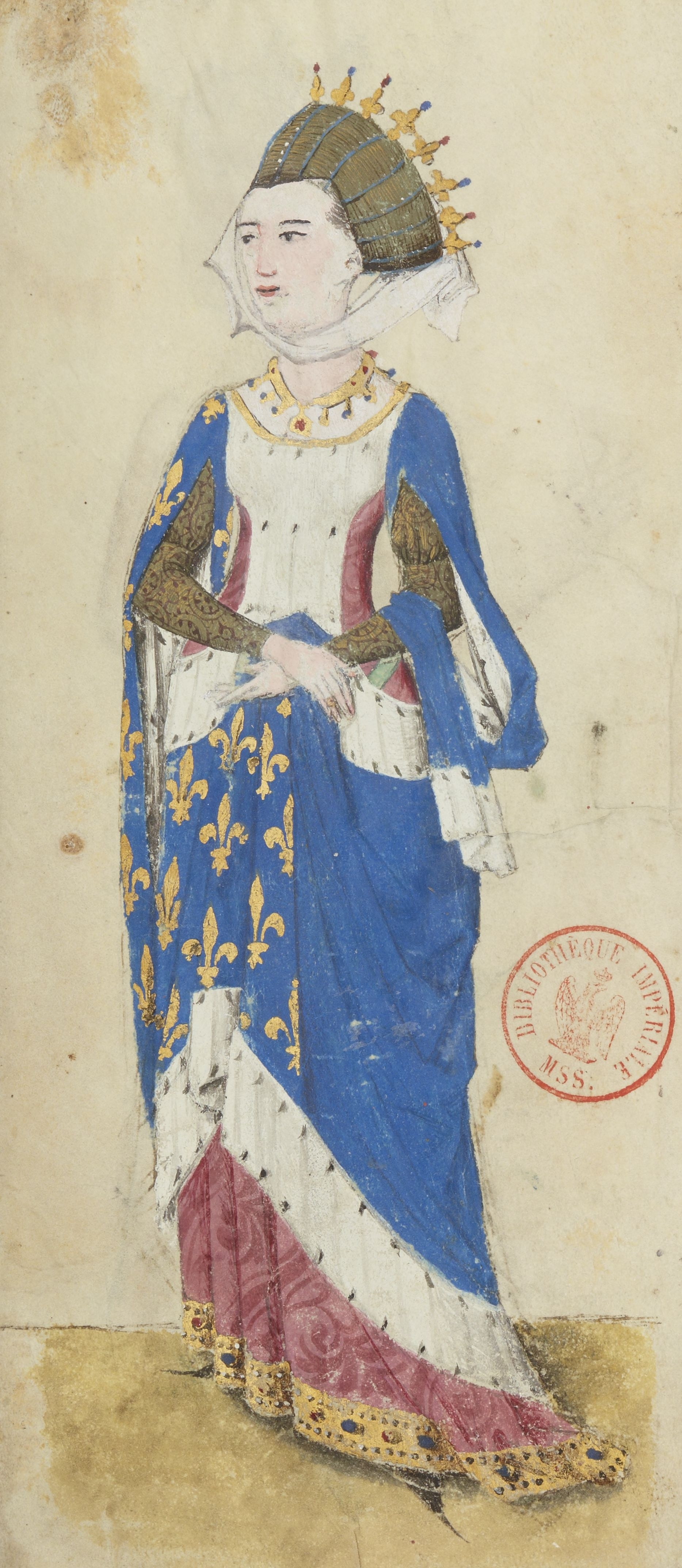 relevé de l' Armorial d'Auvergne pour Gaignières.